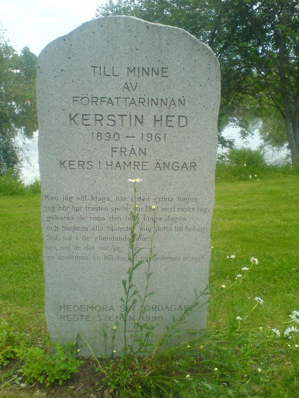 Memorial over Kerstin Hed. Hedemora gammelgård, Sweden